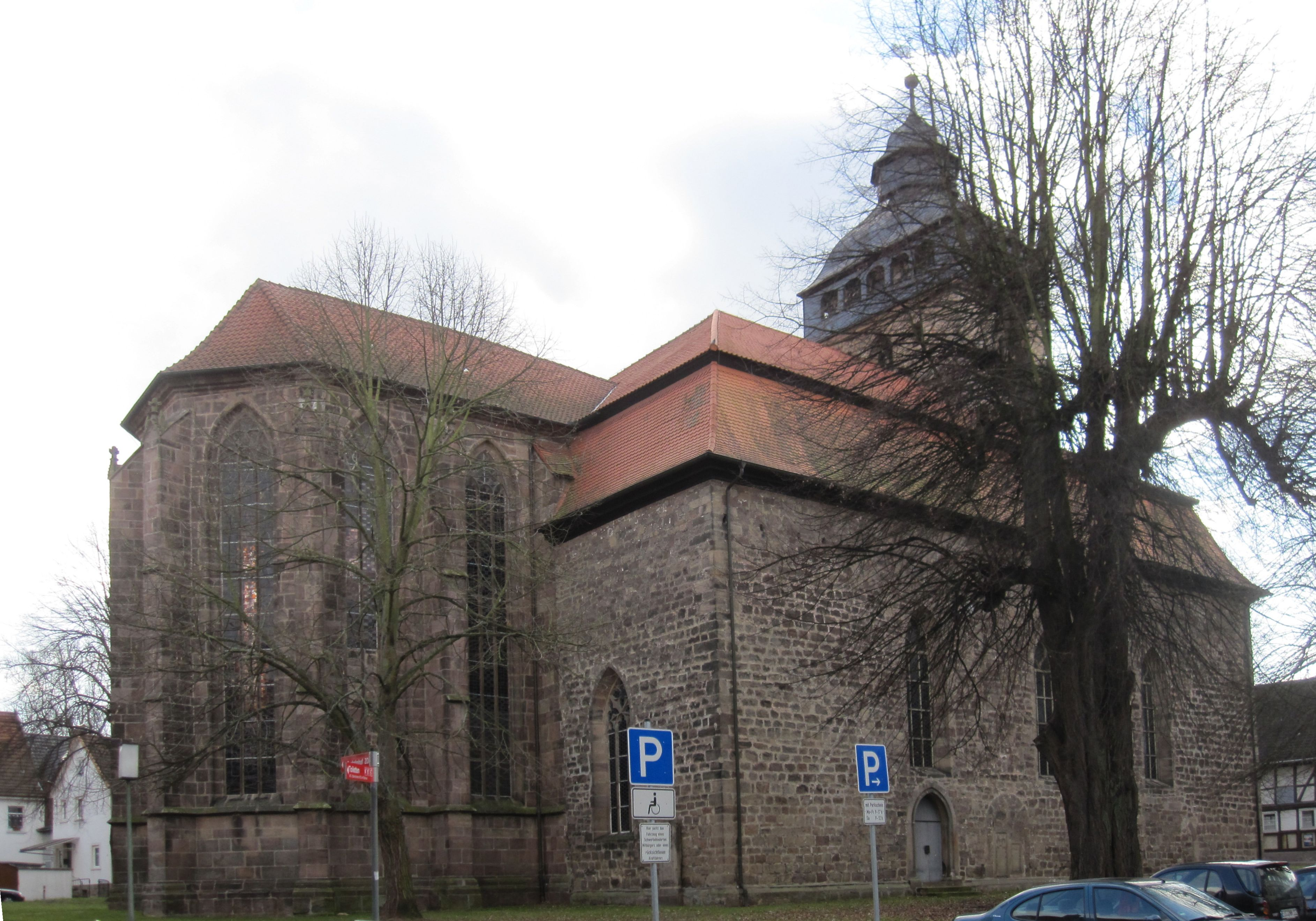 Witzenhausen: Liebfrauenkirche, Baubeginn wohl 1232. Im 13./ 14. Jahrhundert umgeformt in eine gotische Kirche Der romanische Turm stammt noch aus der Entstehungszeit. [1] Information im Regiowiki, abgerufen am 23. Februar 2015.